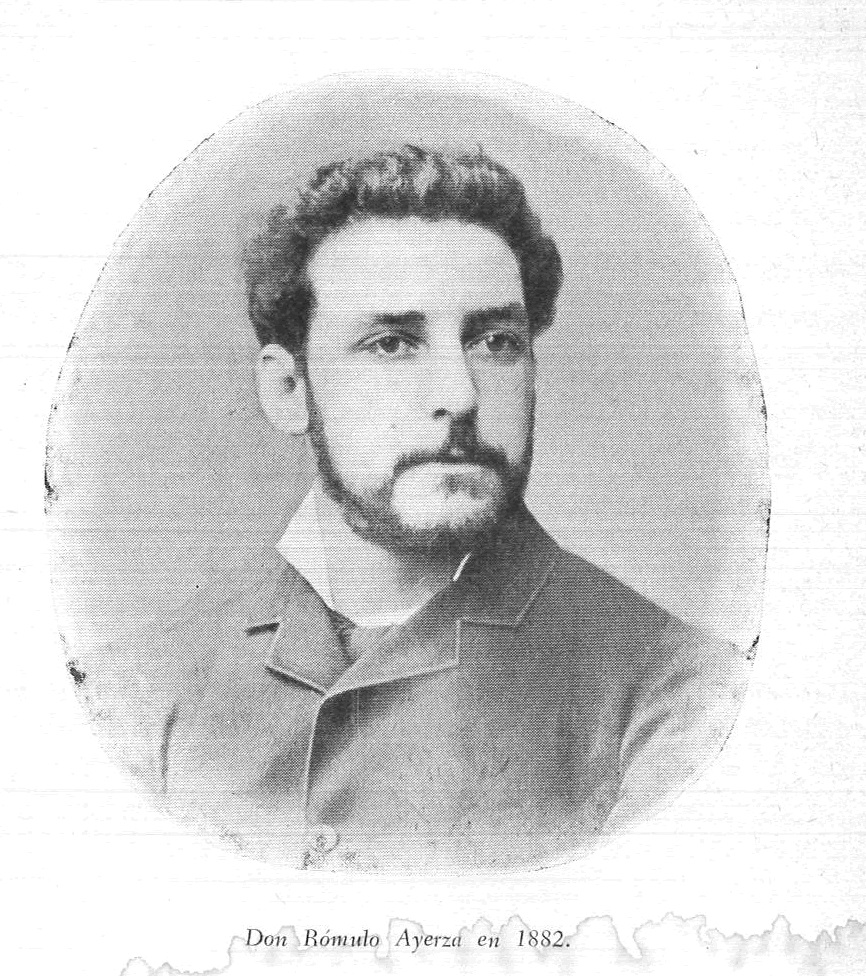 Foto de Rómulo Ayerza